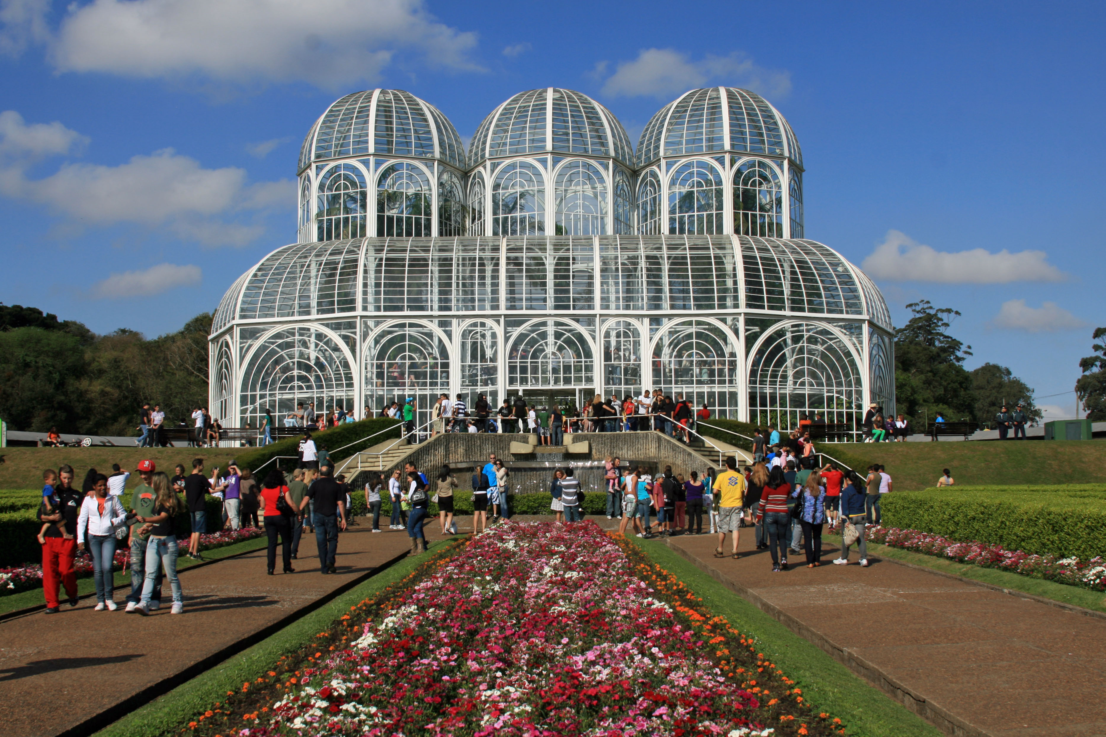 Jardim Botânico Fanchette Rischbieter em Curitiba